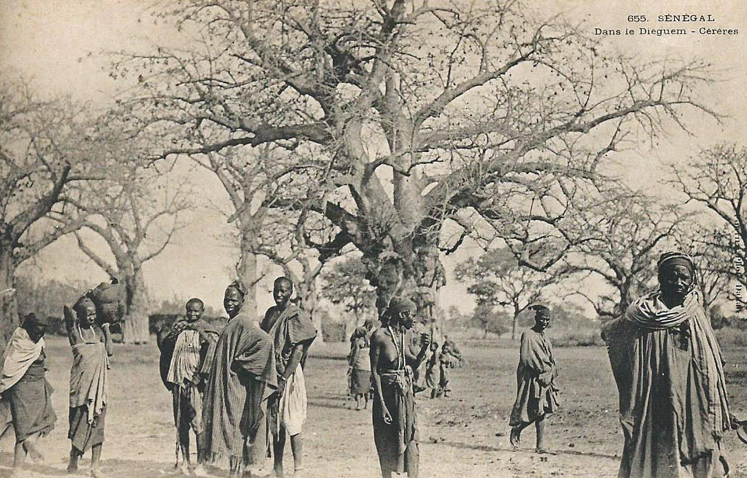 François-Edmond Fortier, Sénégal. Dans le Dieguem. Cérères. Afrique Occidentale - Sénégal.